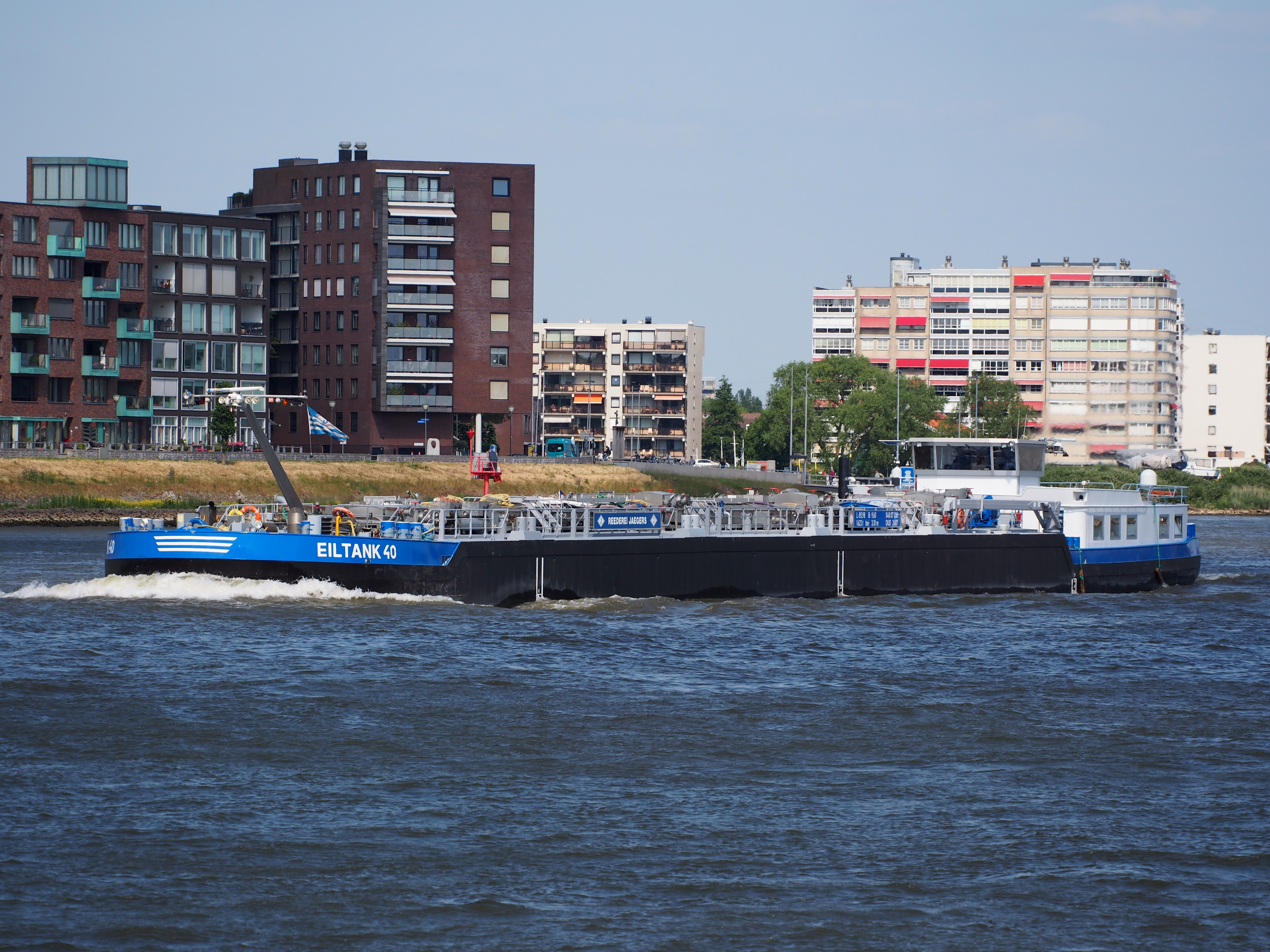 Elitank 40 - ENI 04807330 op de Beneden Merwede, Dordrecht.